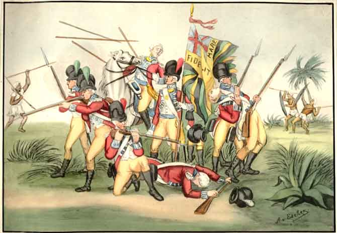 Das Regiment De Meuron in englischen Diensten im Kampf in Indien. Aus: Les Régiments Suisses au service étranger, costumes militaires. Originalbeschreibung: 10. Service d'Angleterre. Régiment de Meuron, 1800. aux Jndes anglaises. Originalformat: 18.4 x 27 cm